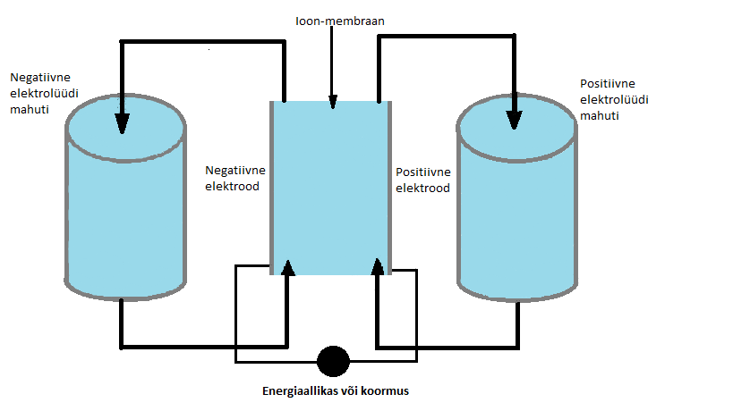 PCB aku tööpõhimõte